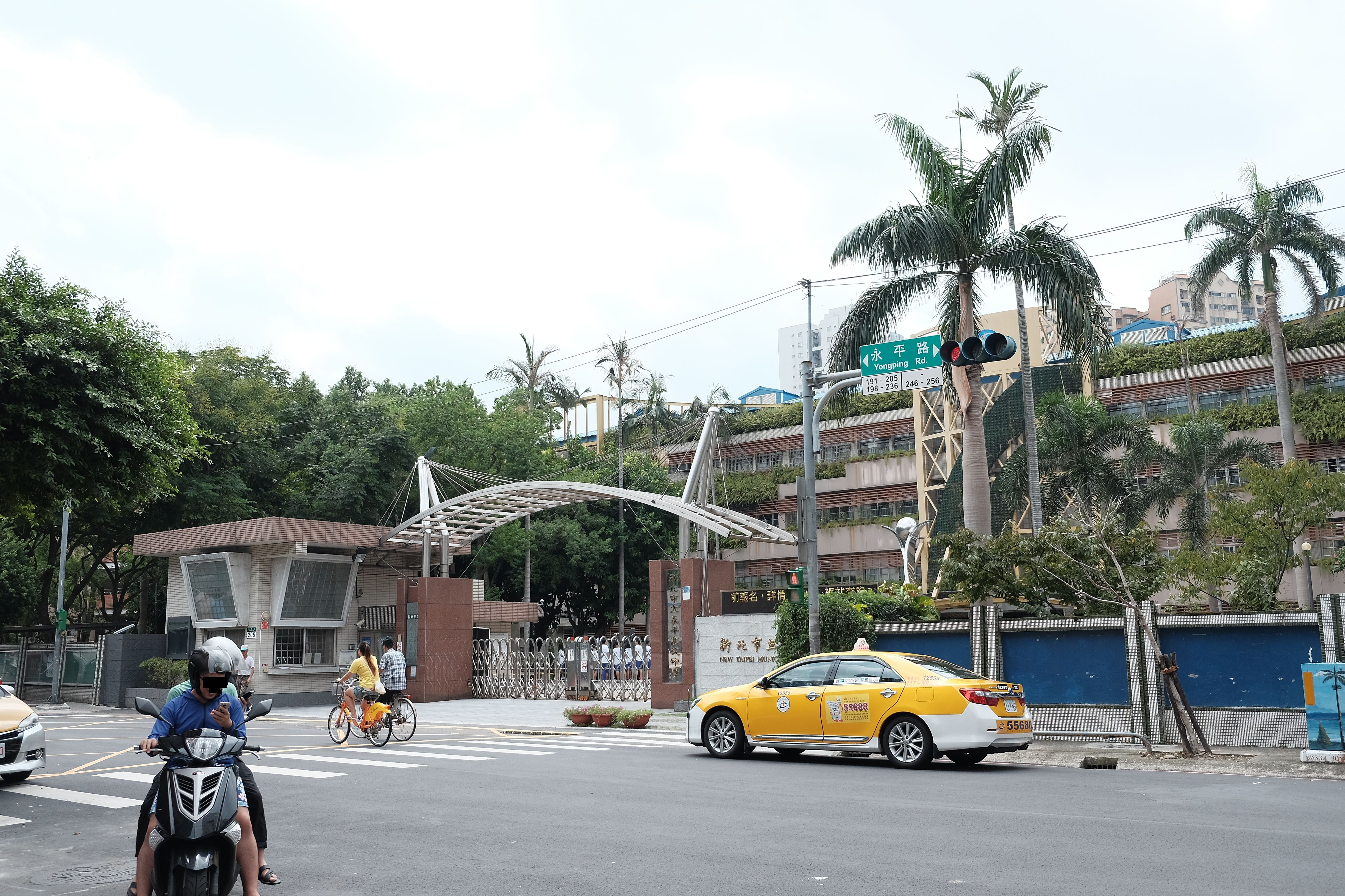 新北市立永平高級中學